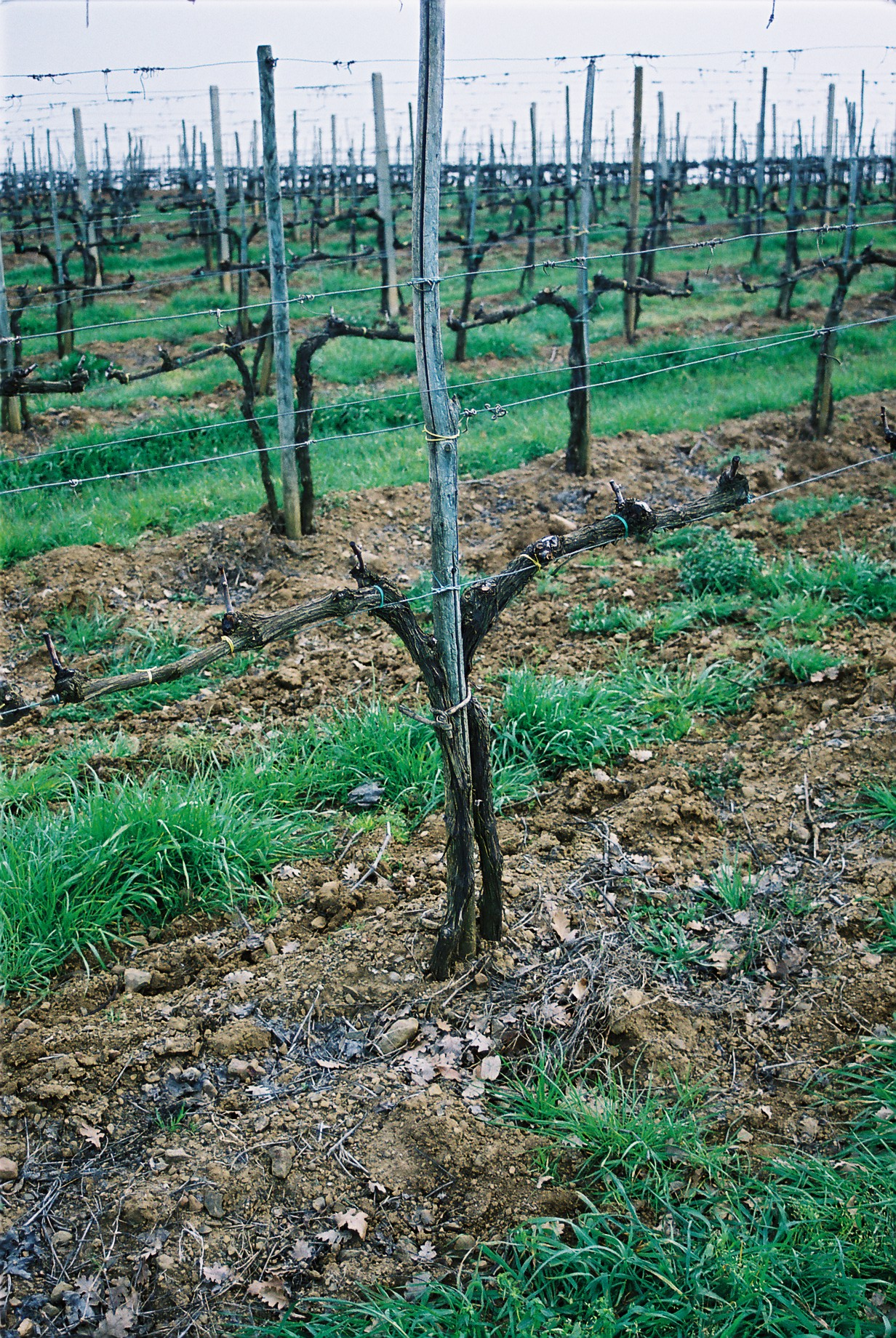 Spaliererziehung mit Kordon mit Zapfenschnitt, Doppelstockpflanzung